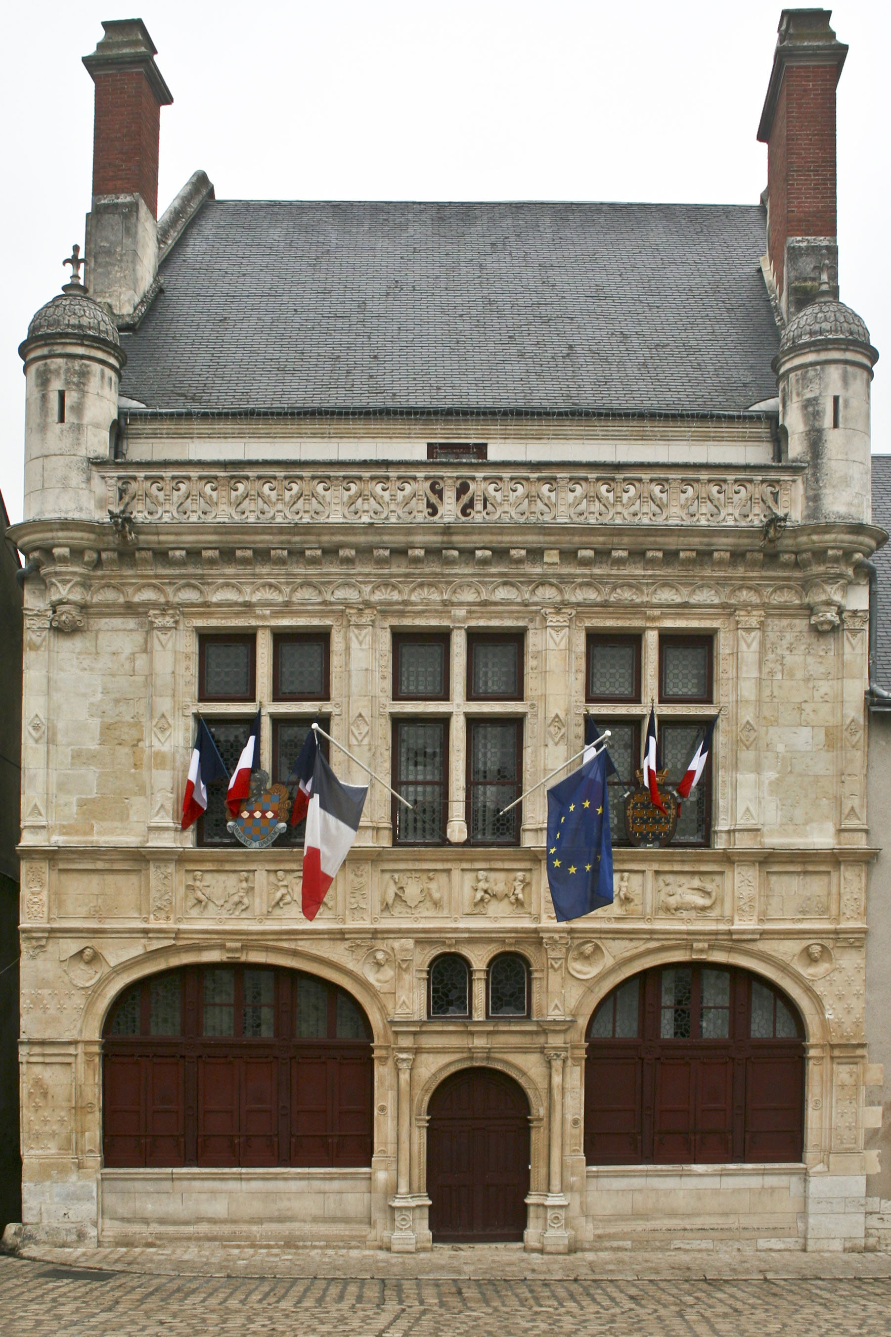 Beaugency (Loiret), France, l'hôtel de ville